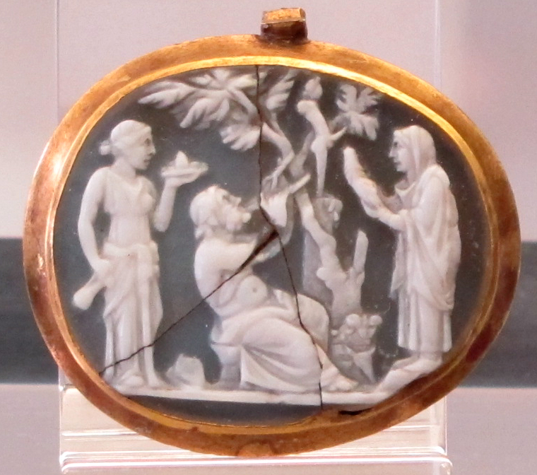 Arte romana, da tesoro cattedrale di chartres, sacrificio a priapo